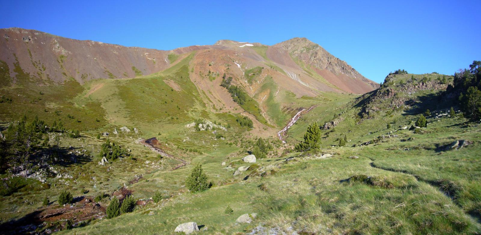 Barranc d'Estany Roi; la Vall de Boí, Alta Ribagorça, Catalunya